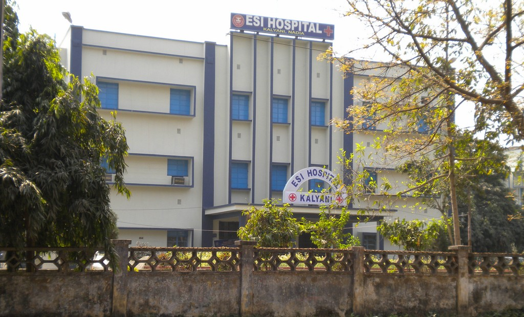 ESI HASPITAL KALYANI